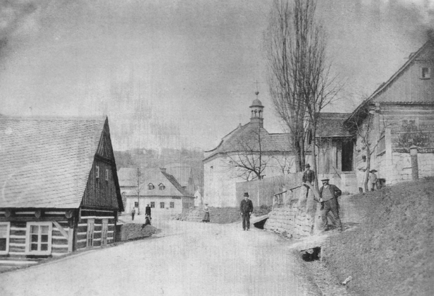 Pohled na panský dům, dnešní náves.